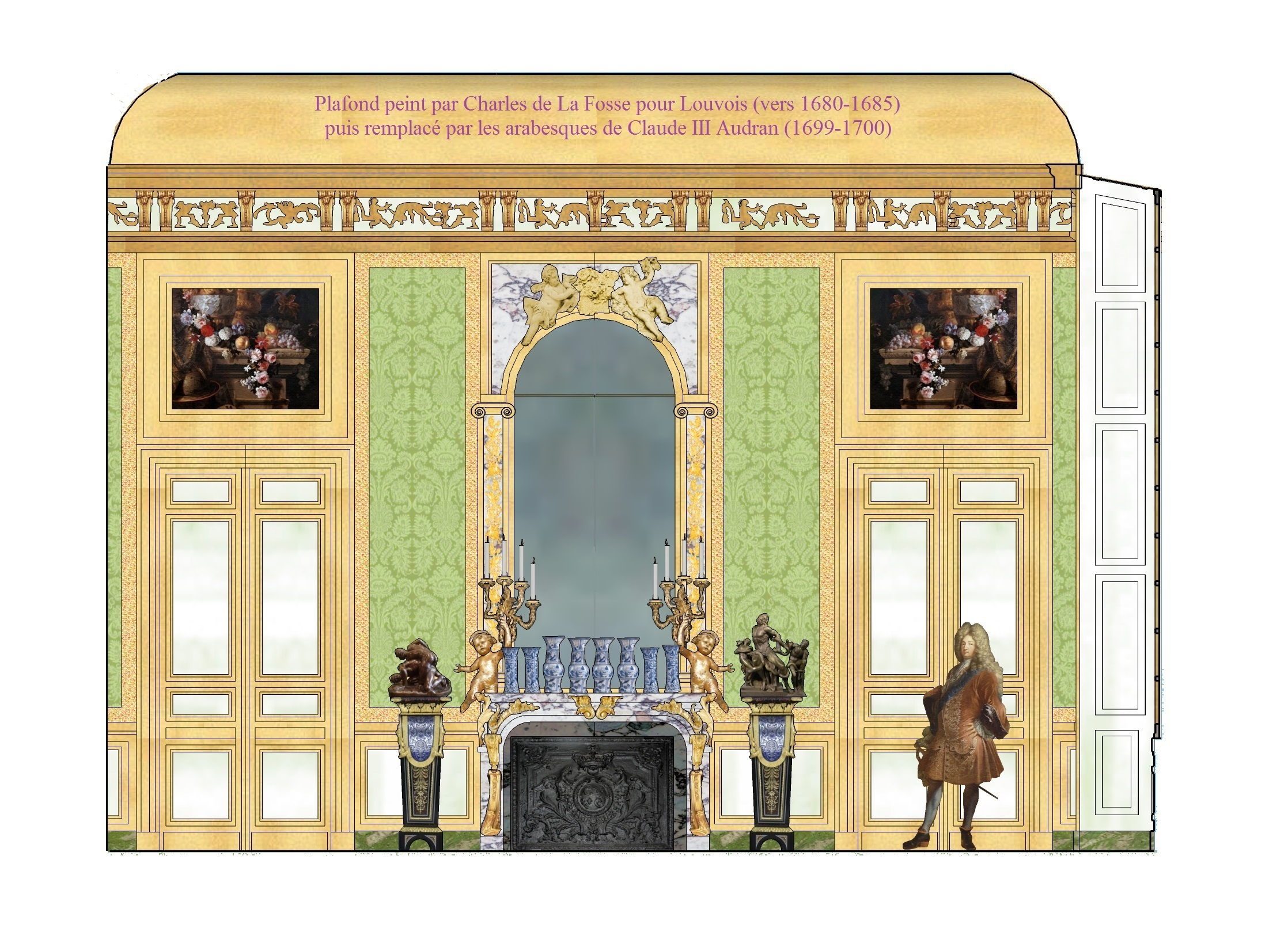 Proposition de restitution du cabinet d'angle du dauphin. Etat entre 1700 et 1792.